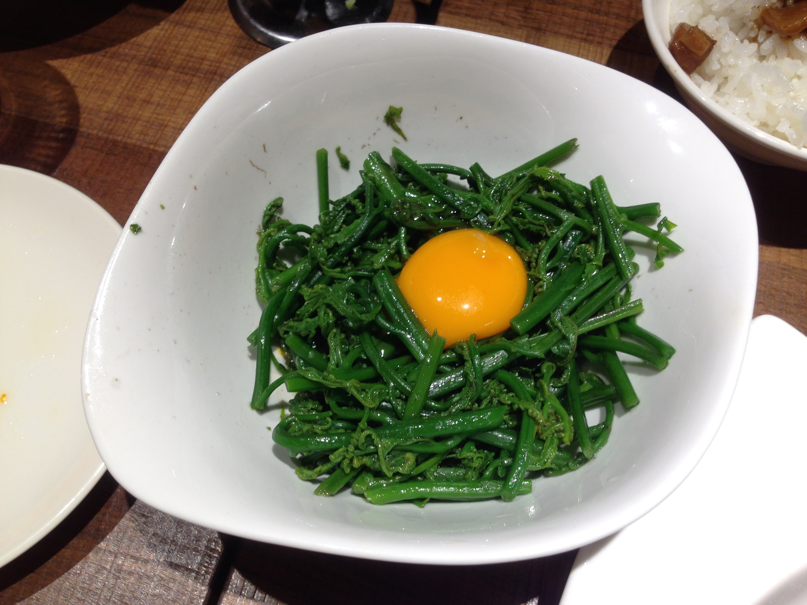 月見過貓, 叁和院, 參和院, 台灣風格飲食, 台北